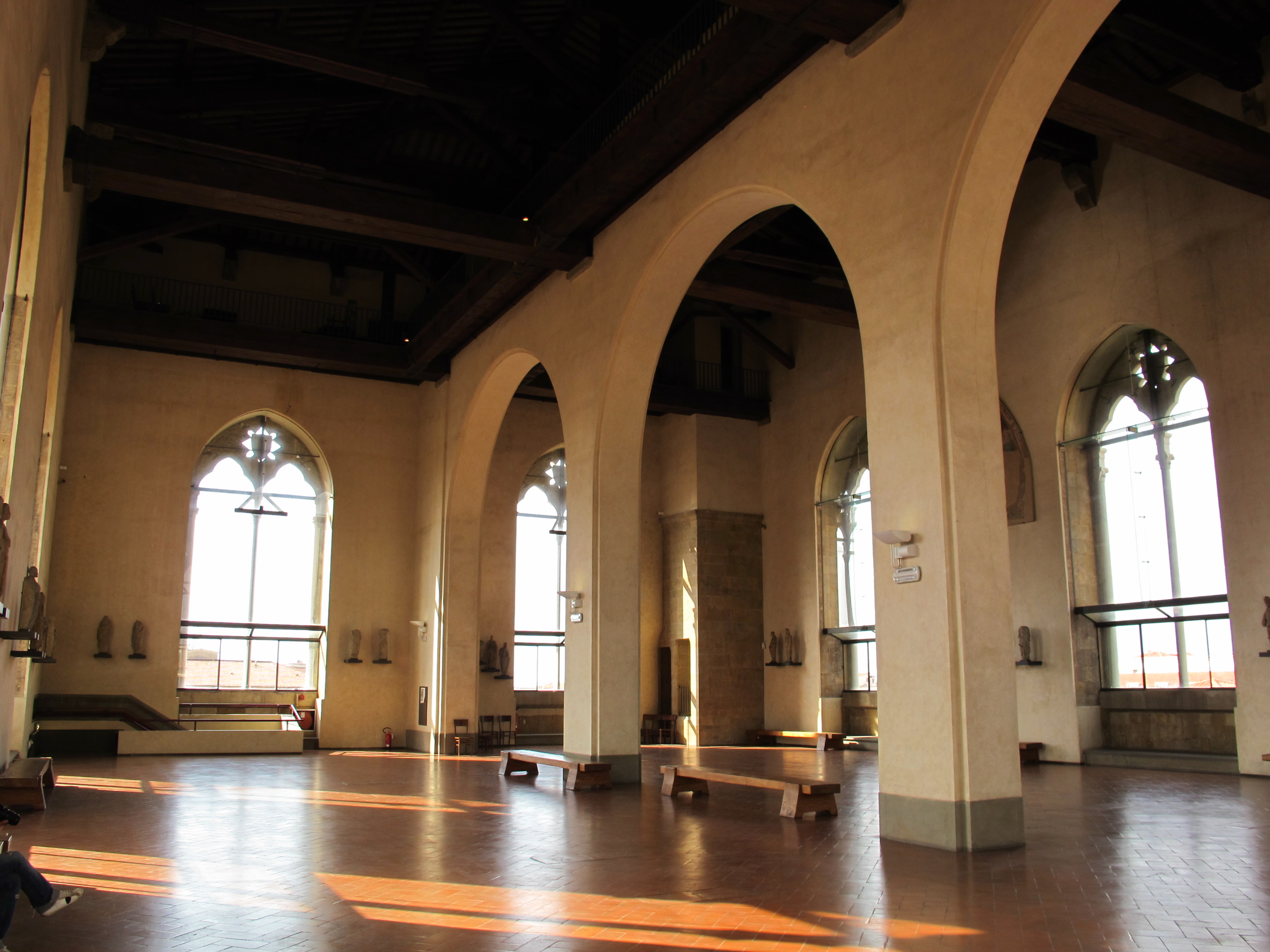 Museo di Orsanmichele - MIBAC This is a photo of a monument which is part of cultural heritage of Italy.